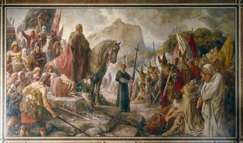 Hermann Wislicenus: Karl der Große zerstört die Irminsäule (Wandbild im Kaisersaal Goslar)